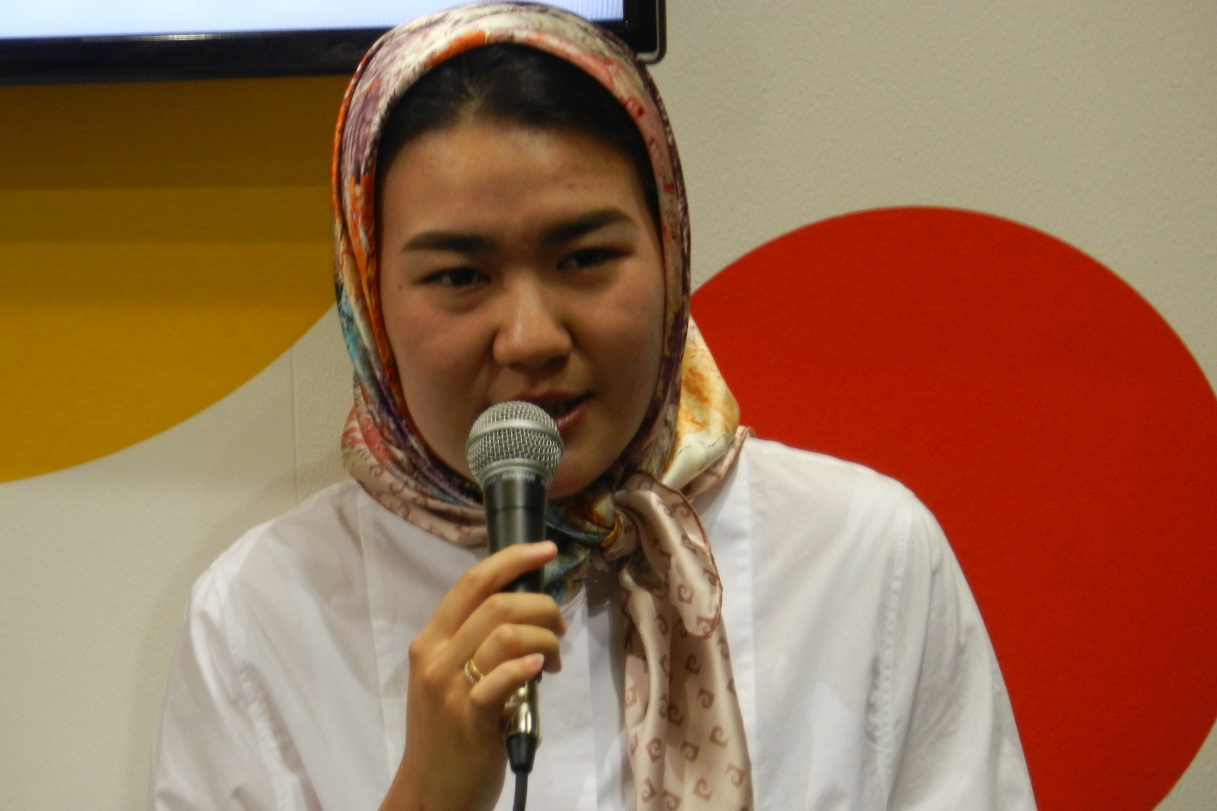 Fatemeh Khavari på Bokmässan i Göteborg 2018.